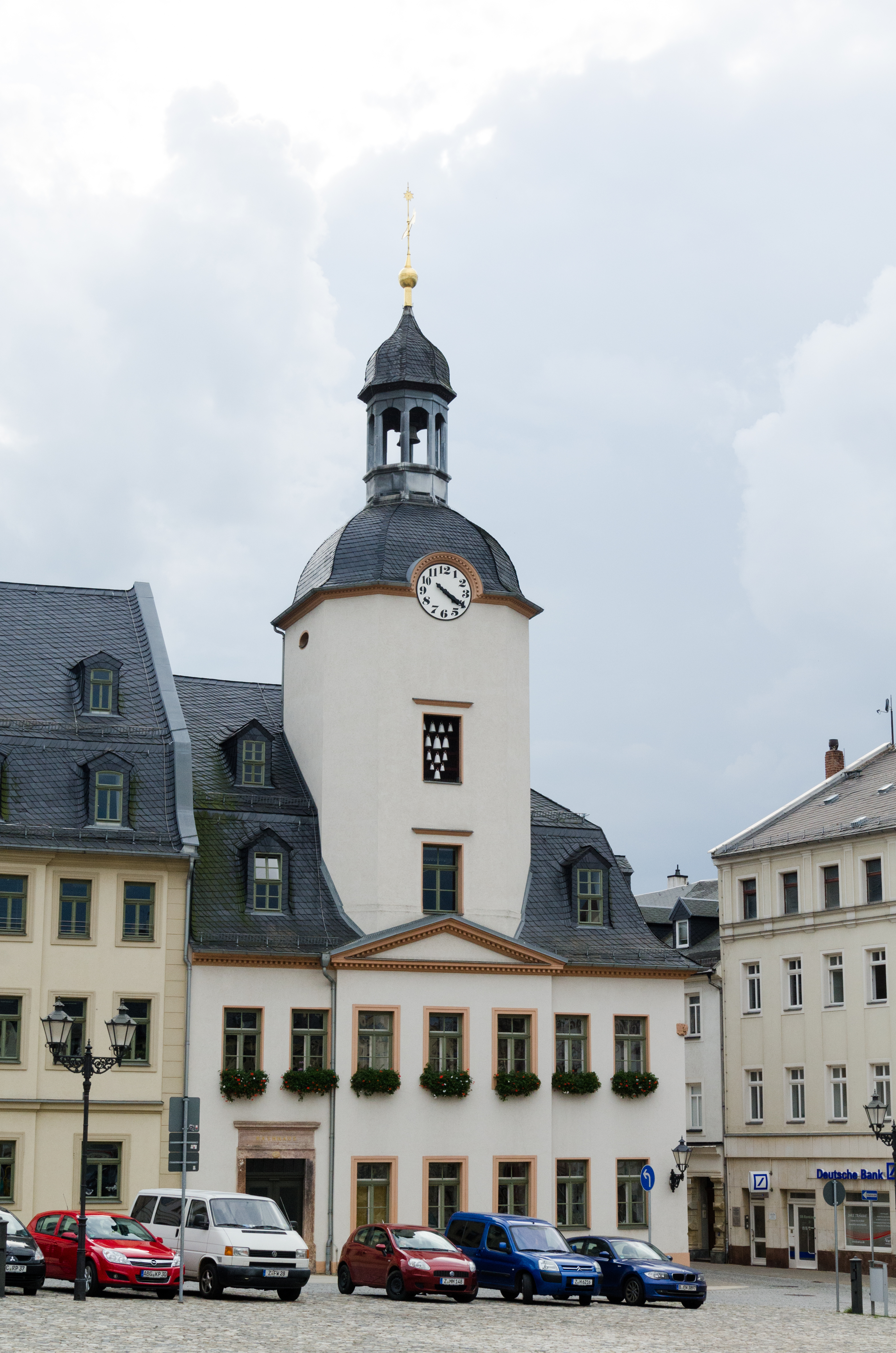 Glauchau, Rathaus